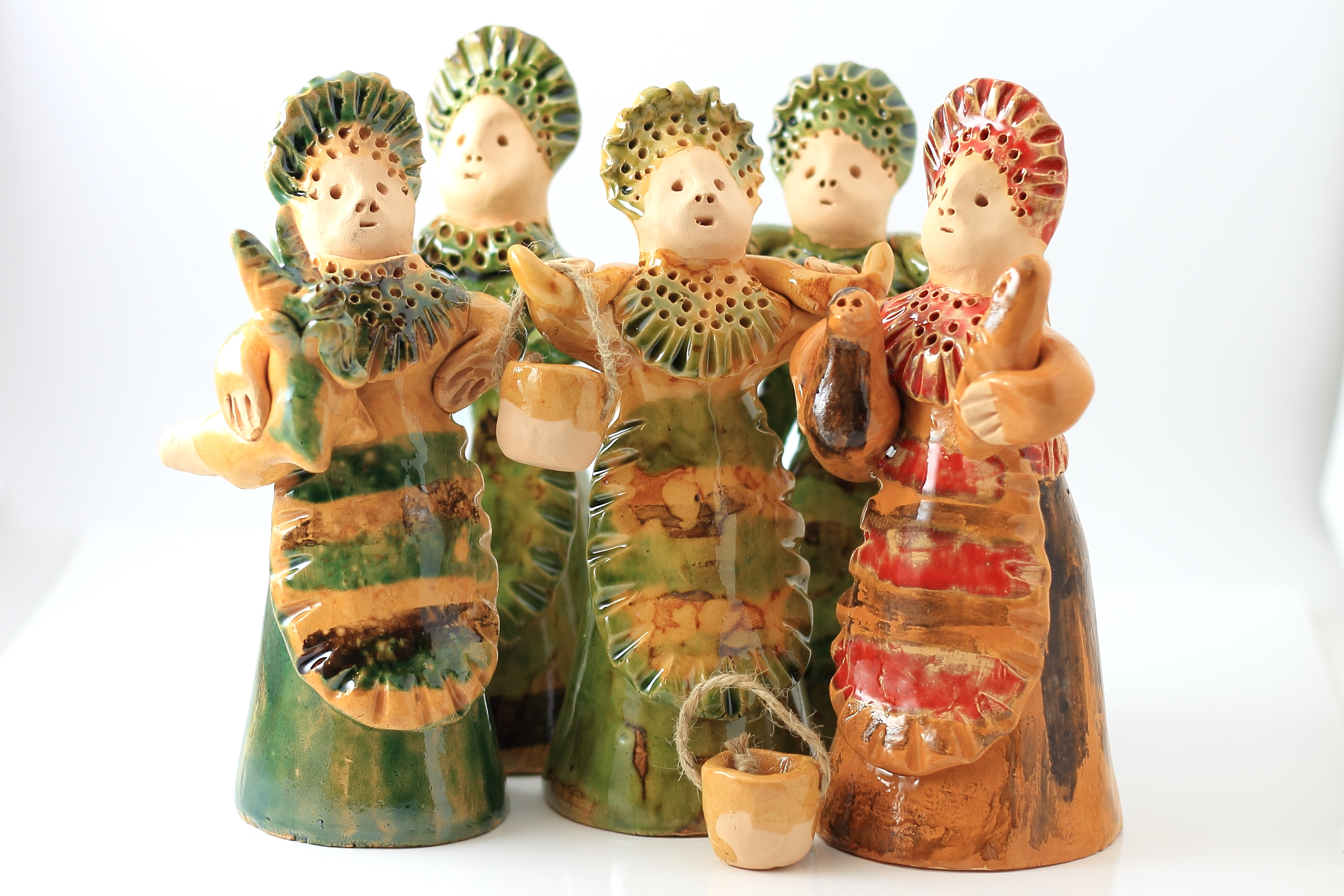 Романушки, традиционный сюжет